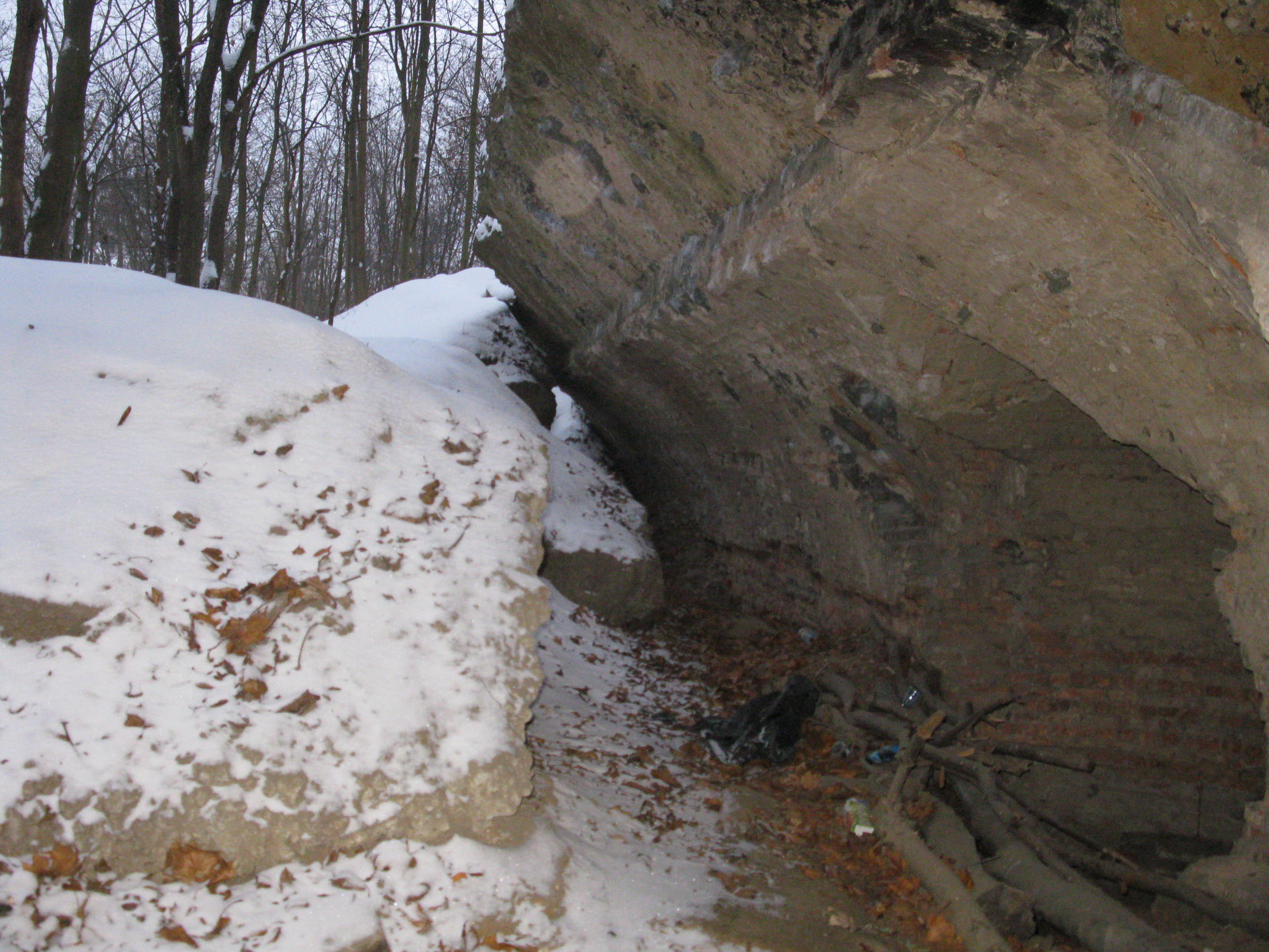 Prawa część koszar